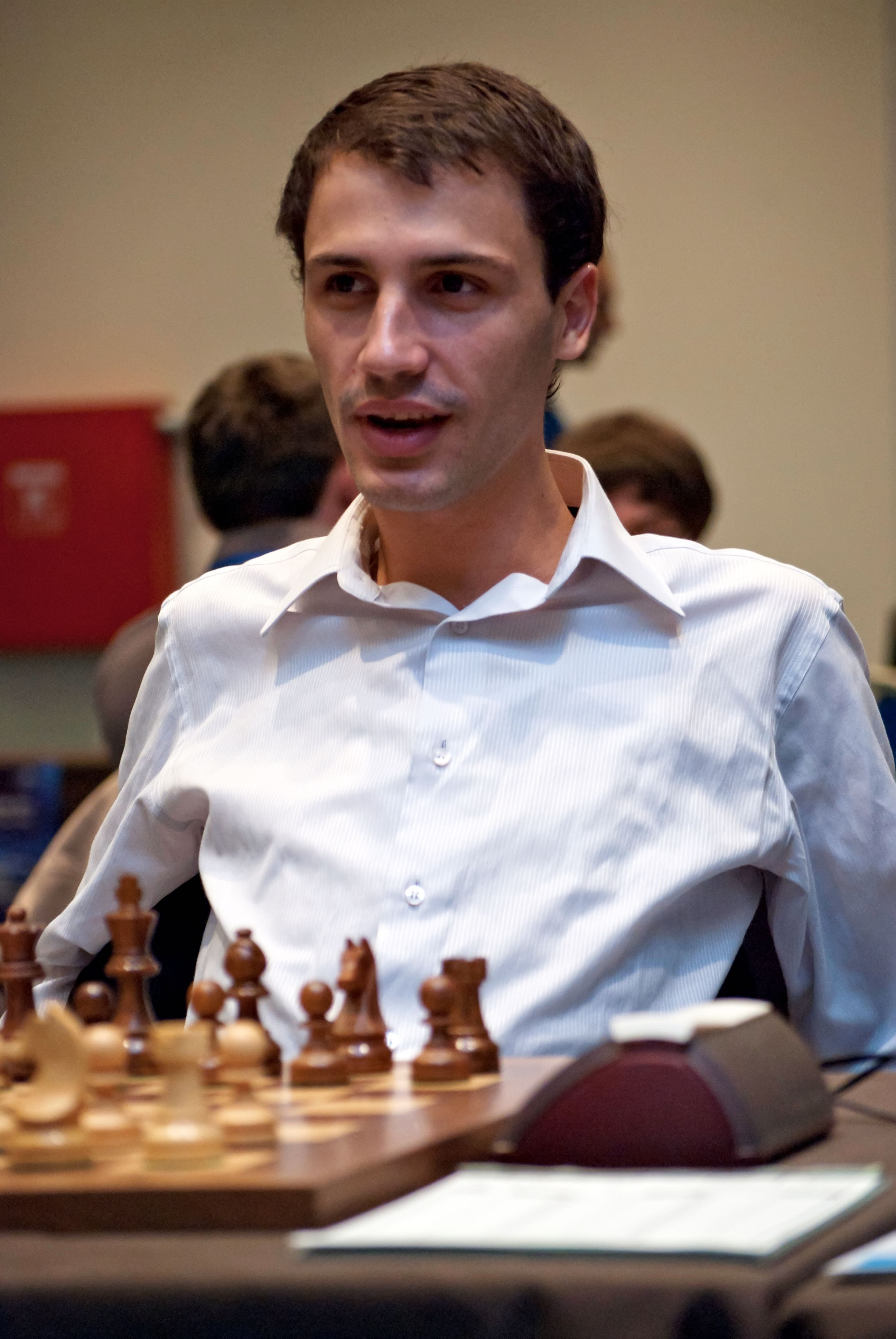 GM Ivan Cheparinov, EchT Pórto Cárras 2011